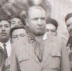 General Adalberto Tejeda, Gobernador de Veracruz